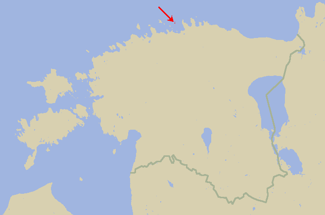 Poloha ostrovní skupiny Malusid na mapě Estonska.